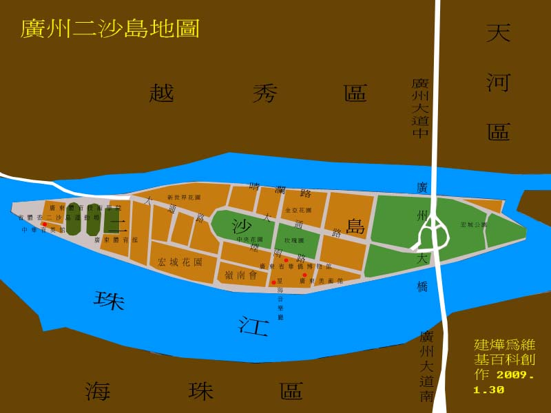 二沙島地圖